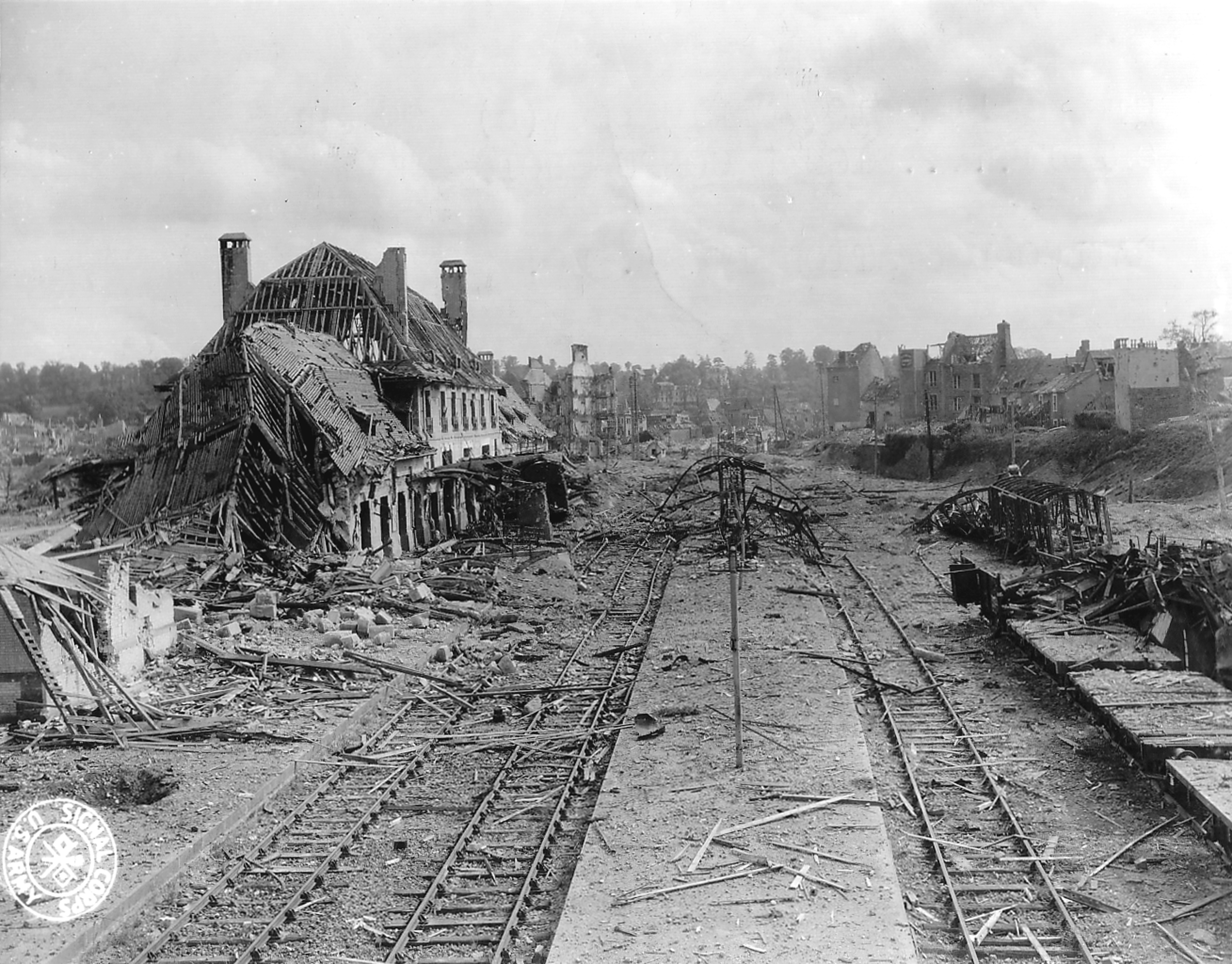 Gare et ville de Saint-Lô détruite Railway station and city of Saint-Lô (Normandy) destroyed